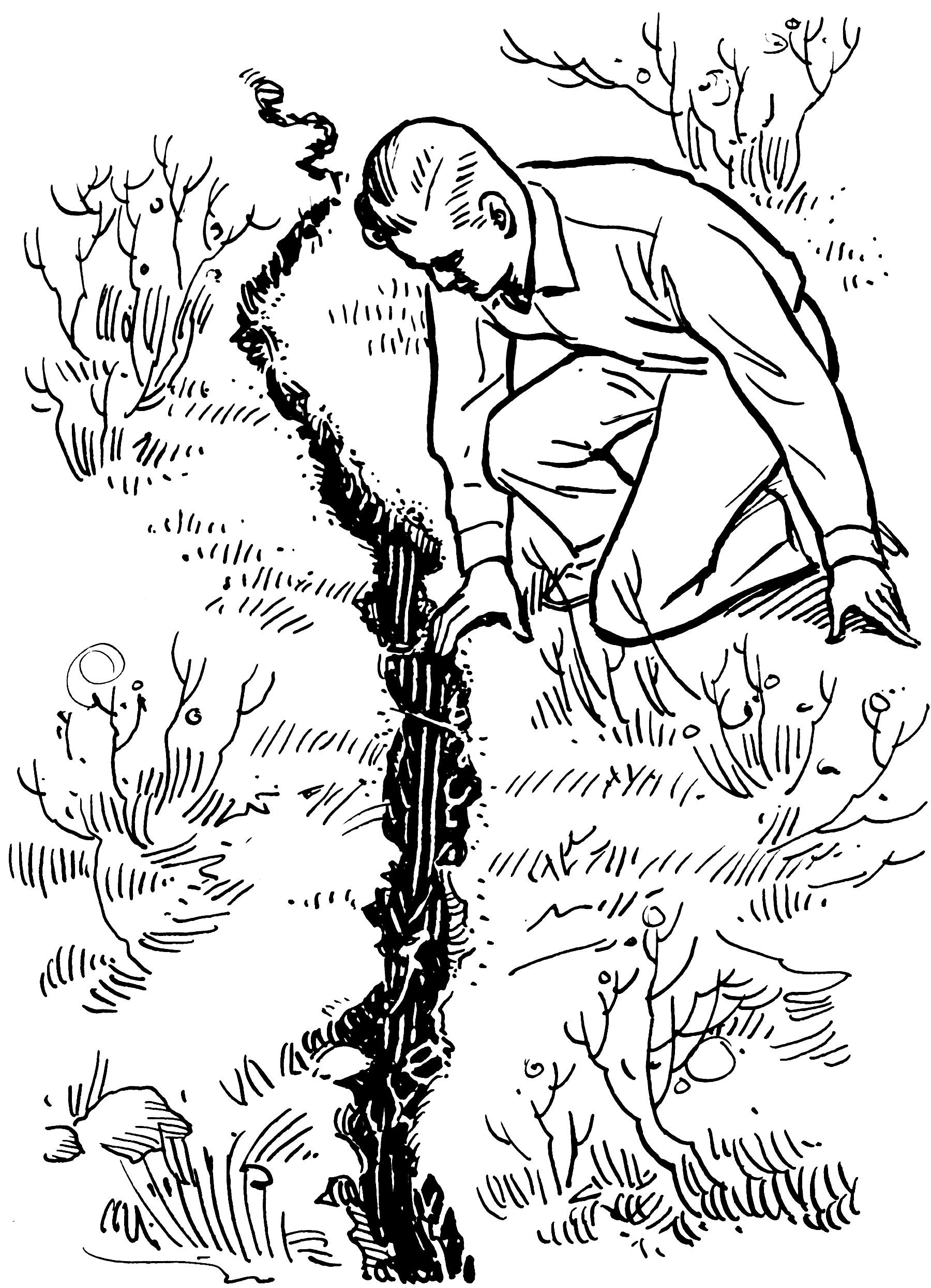 Fissure